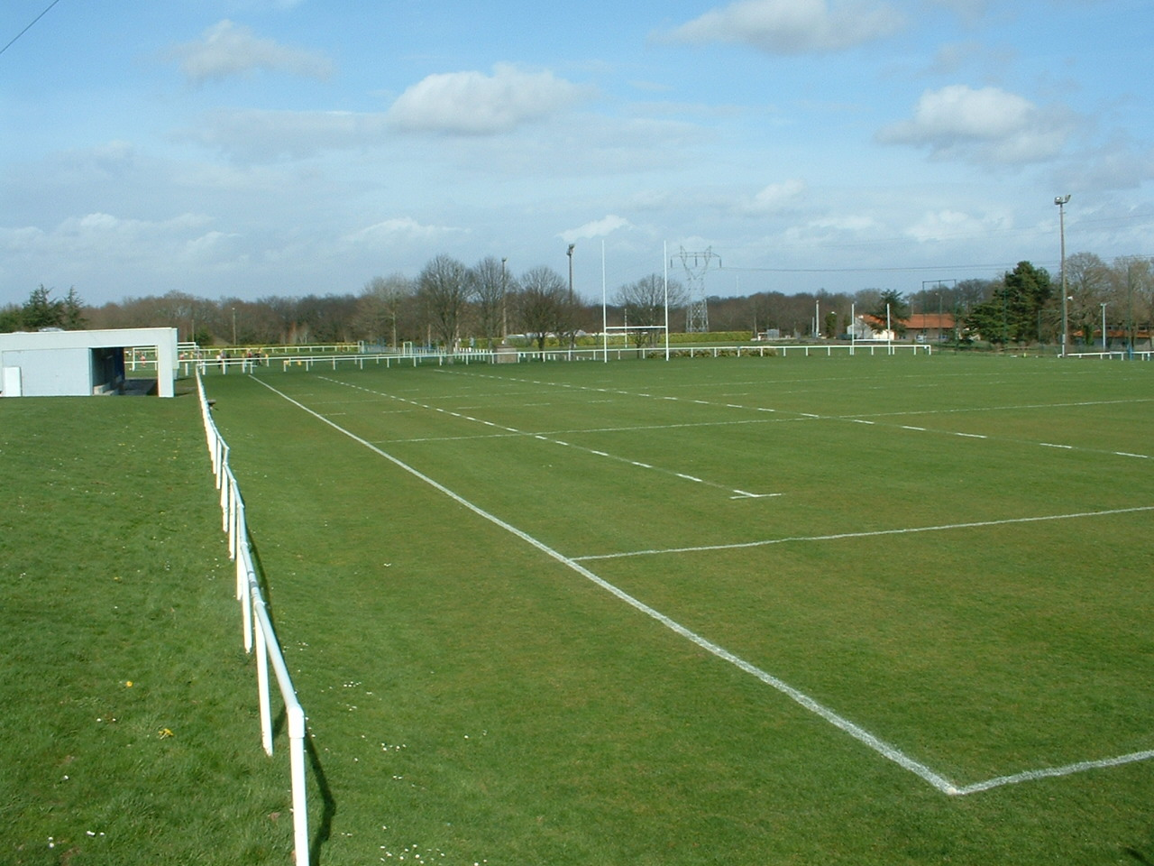 Rezé (France) - Stade de la Robinière (plusieurs terrains)